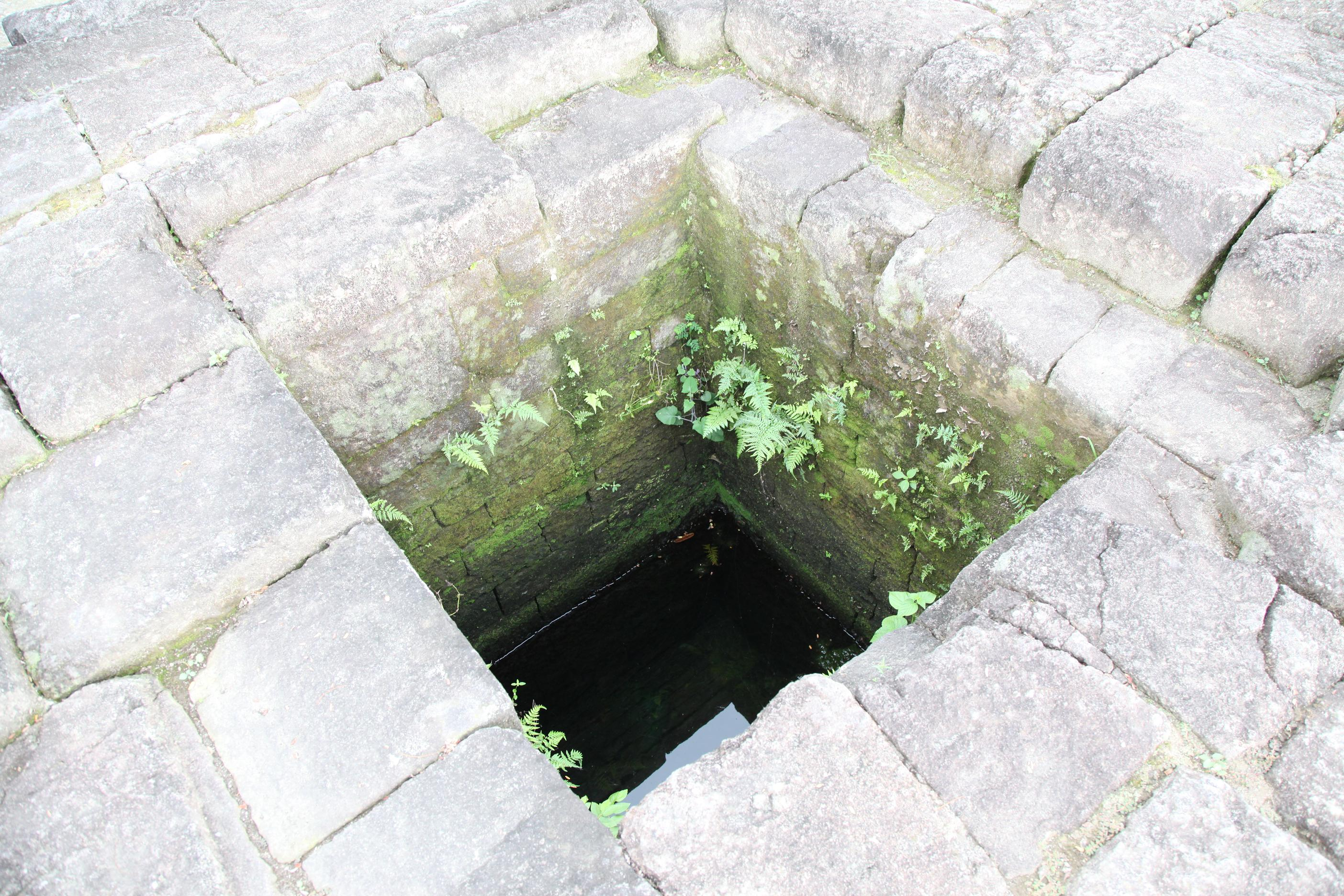 Situs Sumberagung (Sumberagung Temple describe)